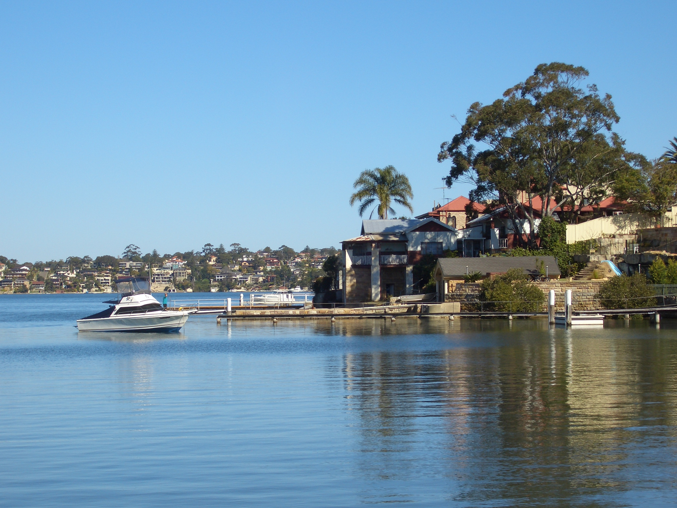 Kyle Bay, Sydney